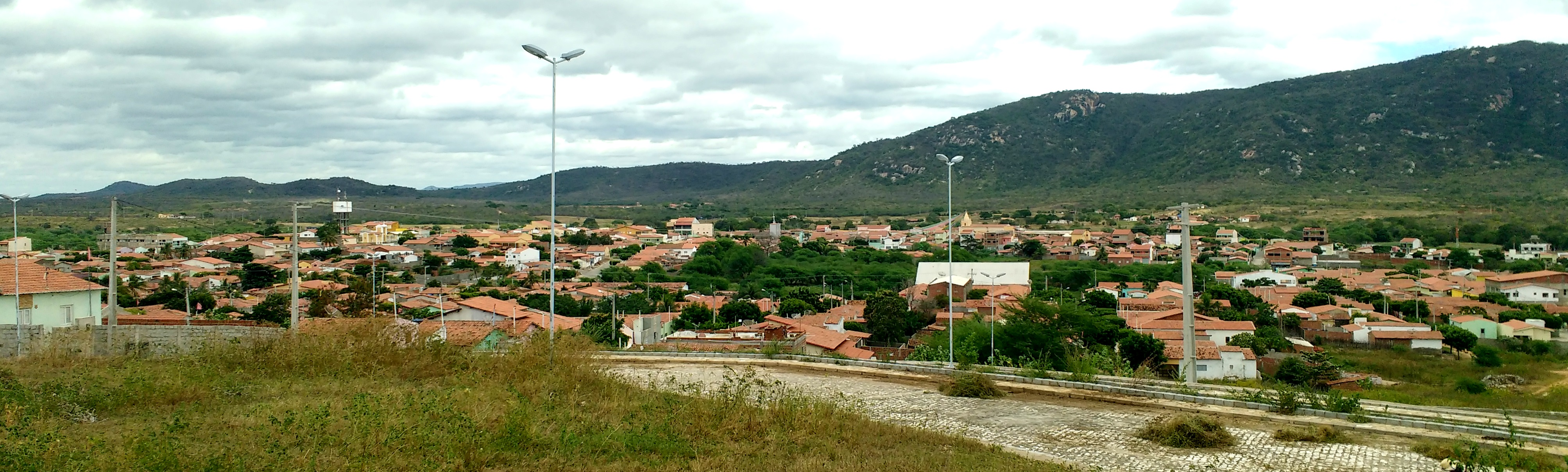 Panorama parcial da cidade de Marcelino Vieira, Rio Grande do Norte (Brasil).